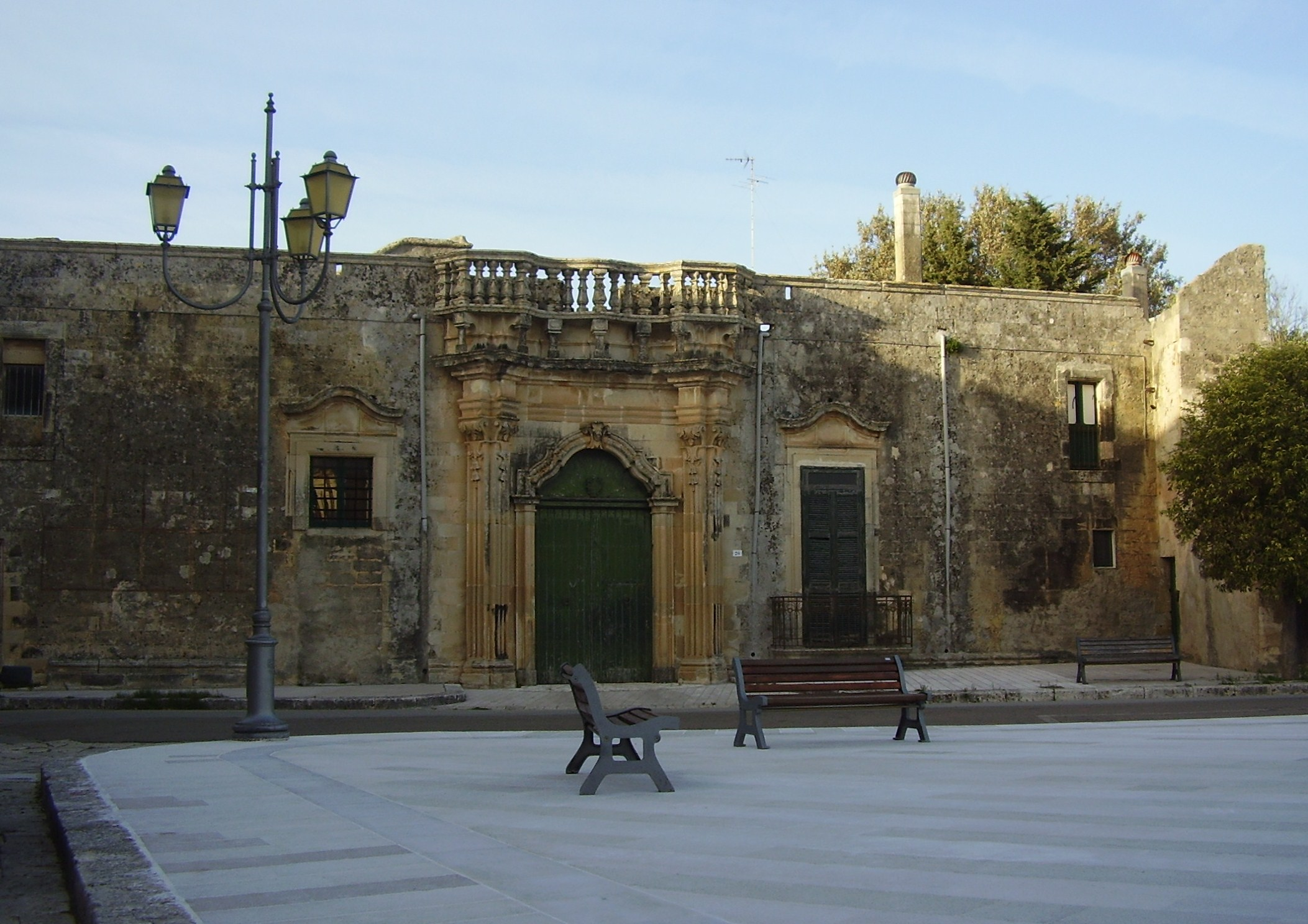 Piazza San Nicola di Cocumola, Lecce